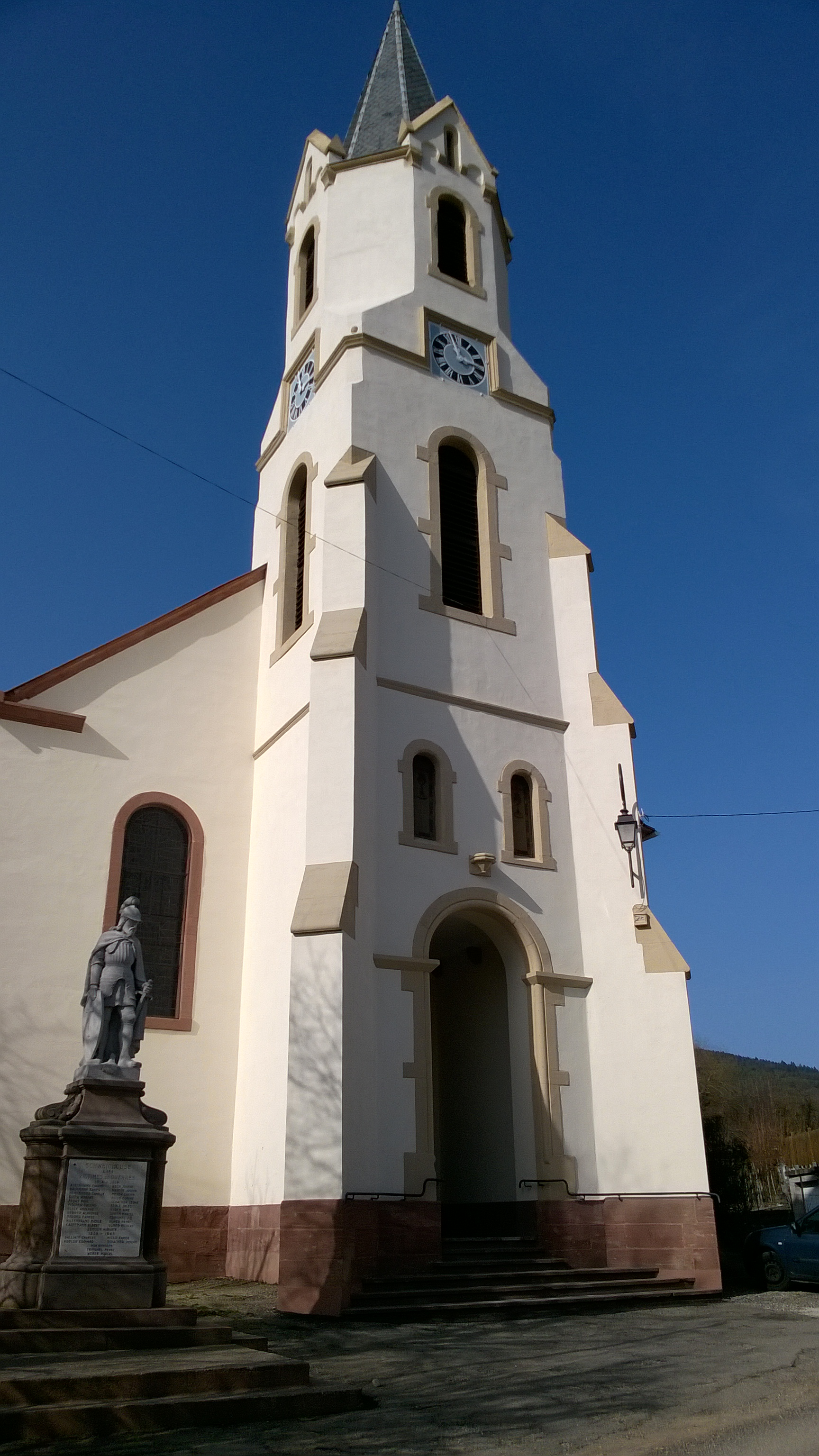 Eglise Saint Michel de Schweighouse Cne de Lautenbach 68610 Rénovation extérieure en 2016, intérieure en 2017